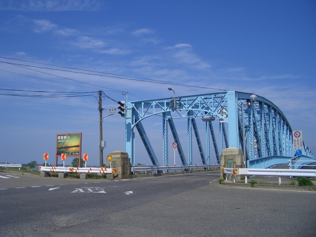 阿賀野川に架かる泰平橋。新潟県新潟市、左岸より。